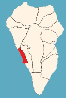 Localización municipio Villa y Puerto de Tazacorte